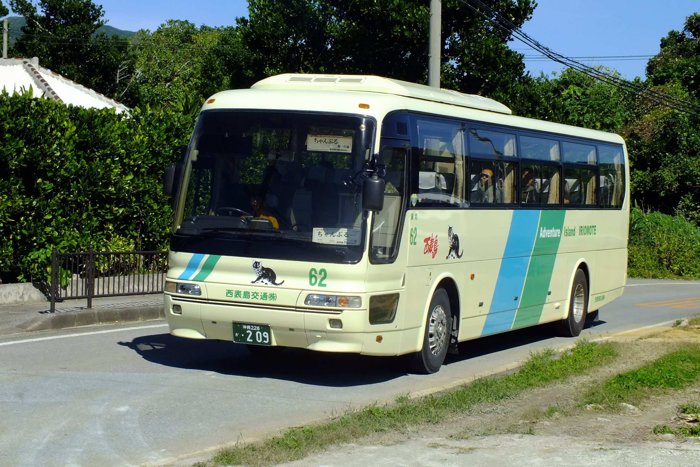 2017-01-29 Iriomotejima Kōtsū bus Komi,Iriomoe-jima bus stop 西表島古見バス停